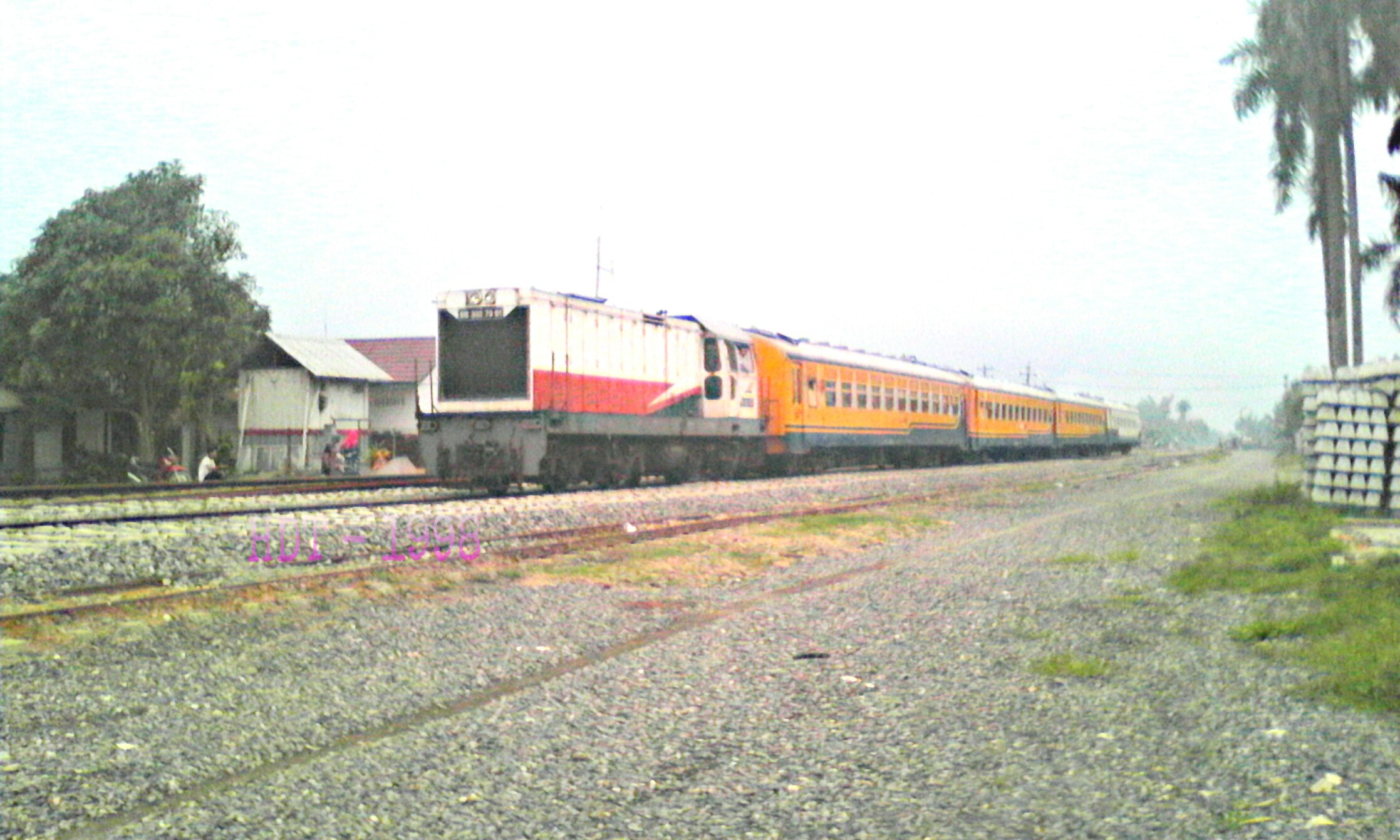 KA.Siantar Ekspres stabling di Stasiun BTK. Sumber gambar milik pribadi (Hagi Hidayah)